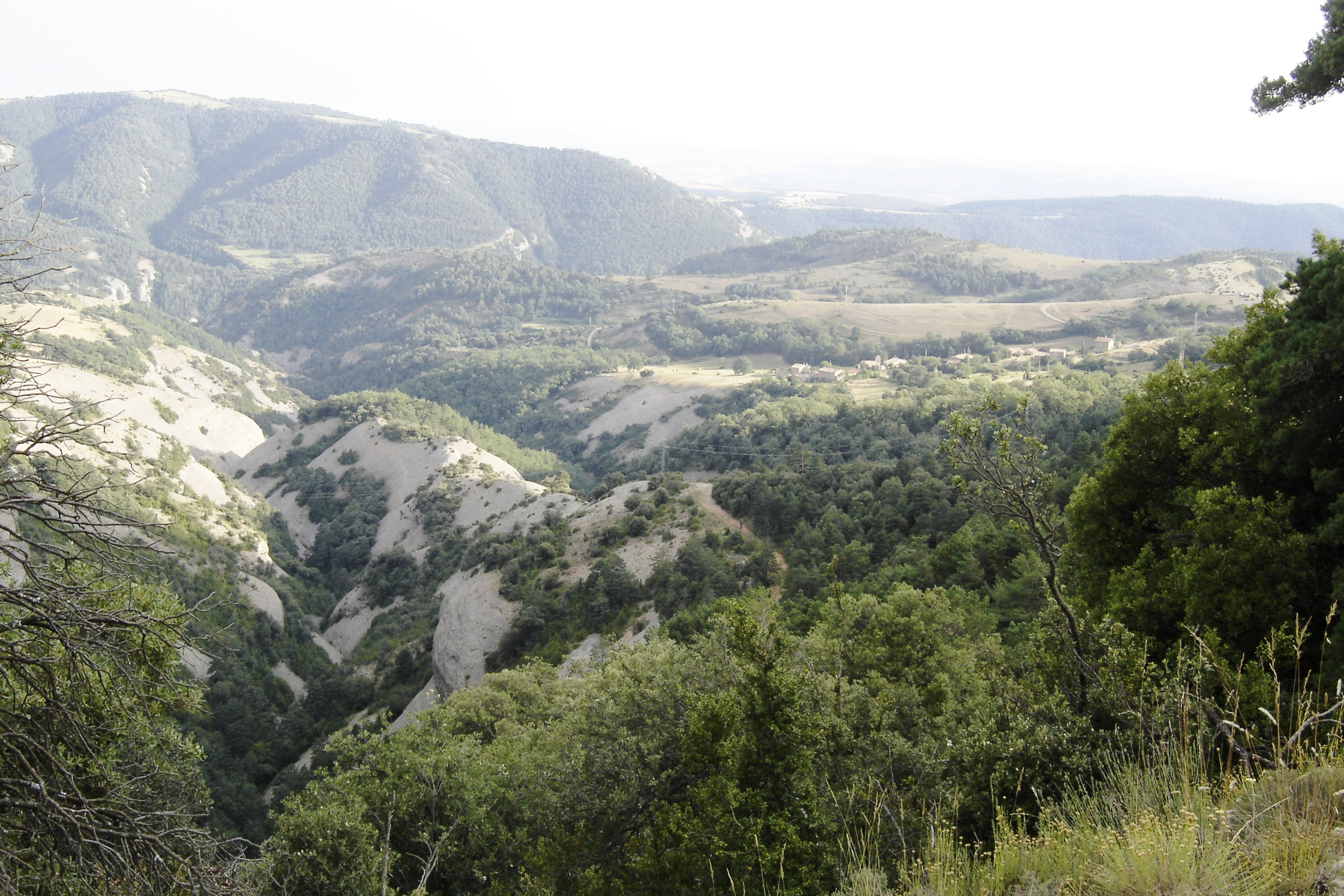 A l'esquerra, el tram final del torrent d'Urdol. A la seva dreta, la riera de Canalda. A la dreta d'aquesta, el poble de Canalda. Al fons, el serrat de Prat d'Estaques conformant el vessant meridional de la canal o vall de la riera de Canalda